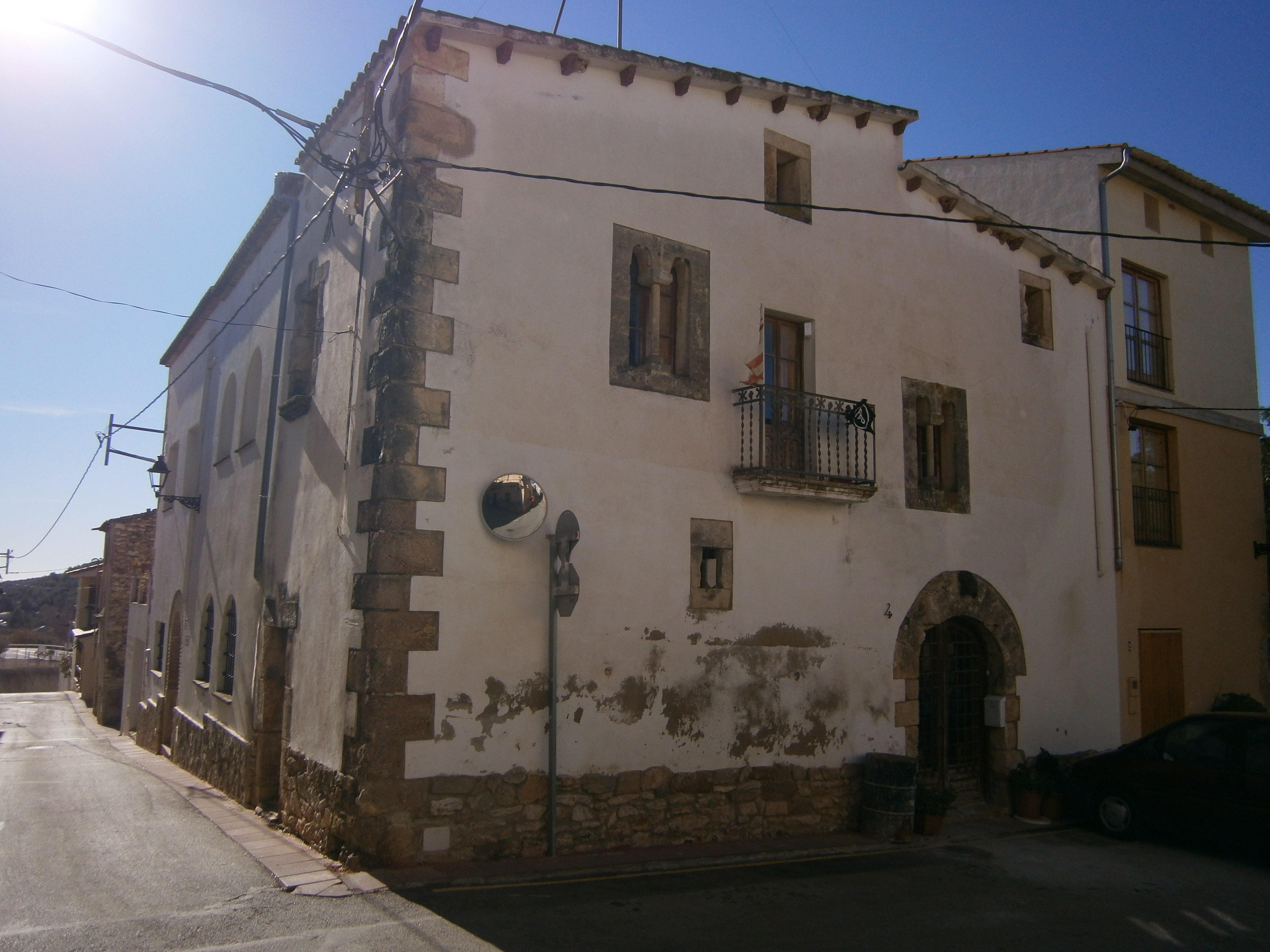 Casa on es cobrava el delme als pagesos de Bonastre